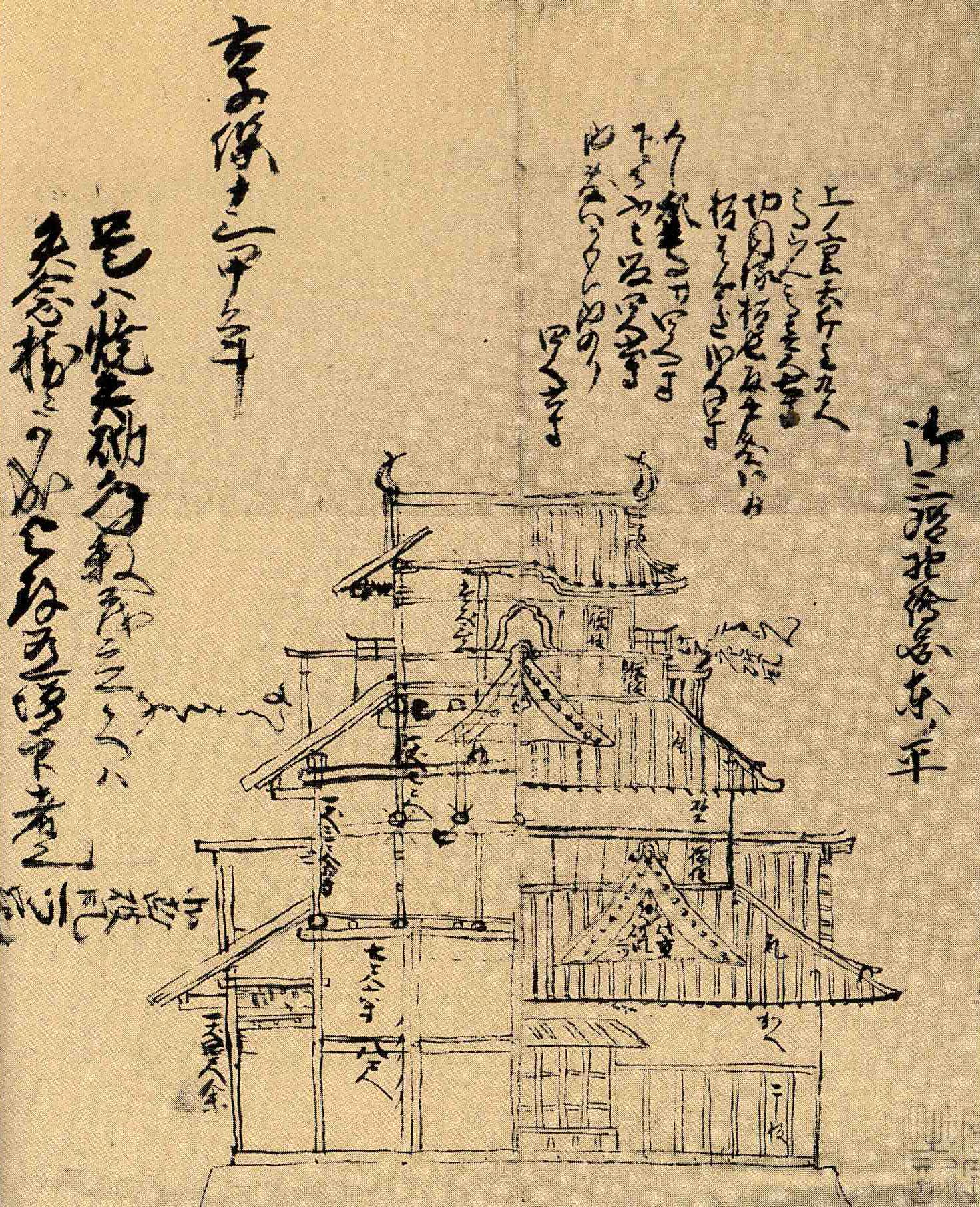 加納城御三階の図